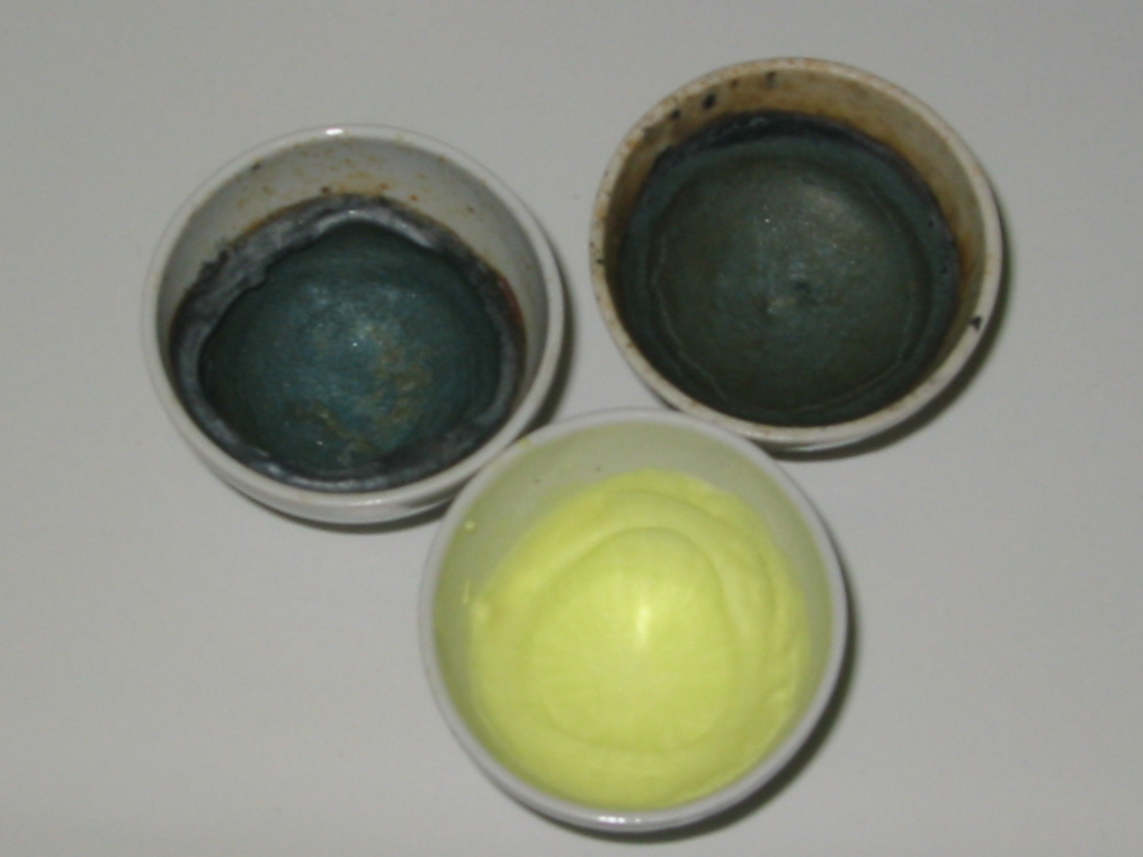 Oxidationsschmelze mit Chrom- und Mangansalzen (Nachweisreaktion und Aufschluss, Analytische Chemie